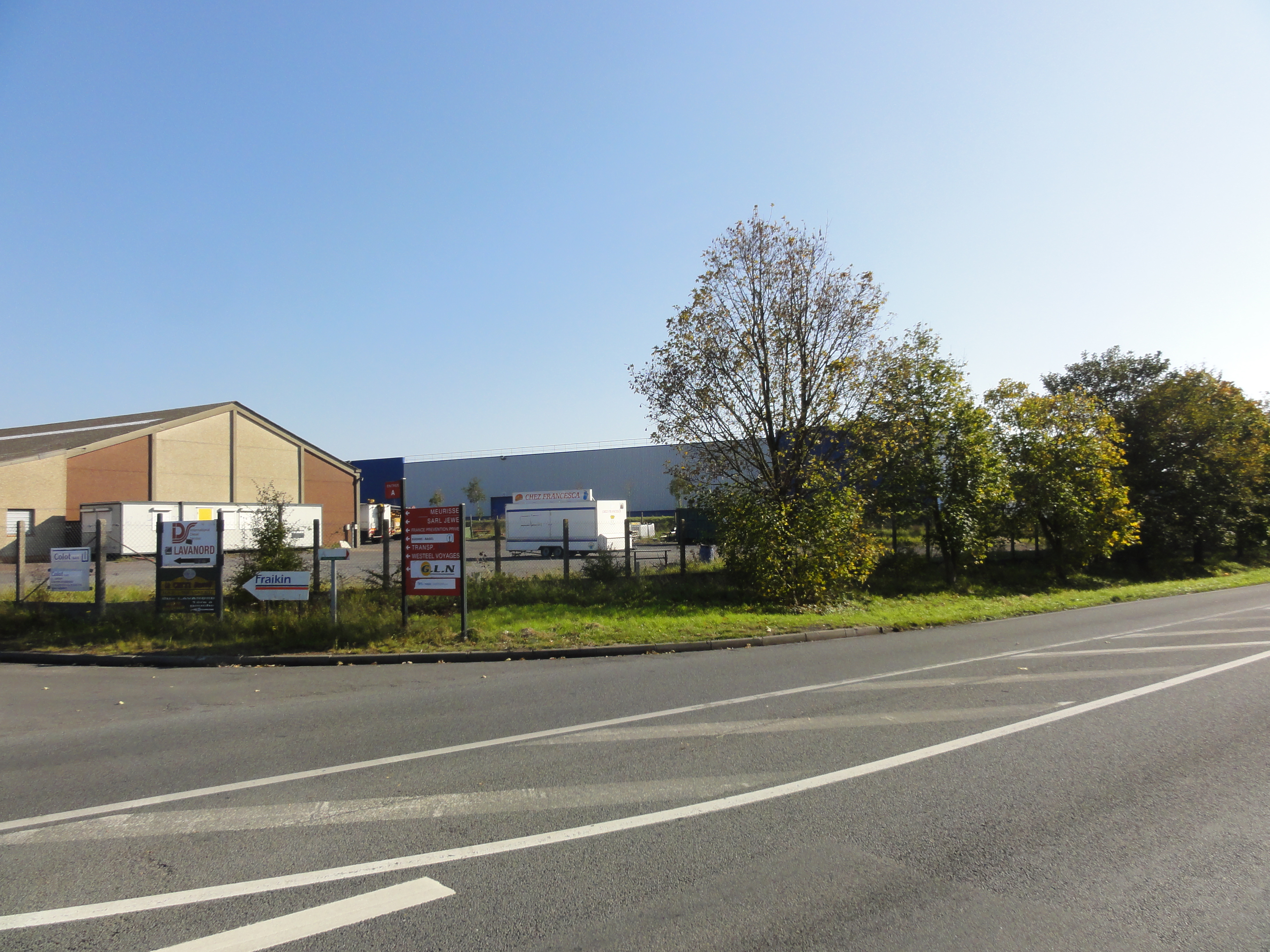 Terril n° 107A dit Aire de stock du 4, disparu, Fosse n° 4 de la Compagnie des mines d'Ostricourt, Libercourt, Pas-de-Calais, Nord-Pas-de-Calais, France.